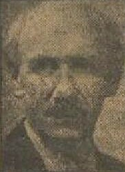 Jaroslav Krepčík (1880-1959), Jaroslav Krepčík (1880-1959)